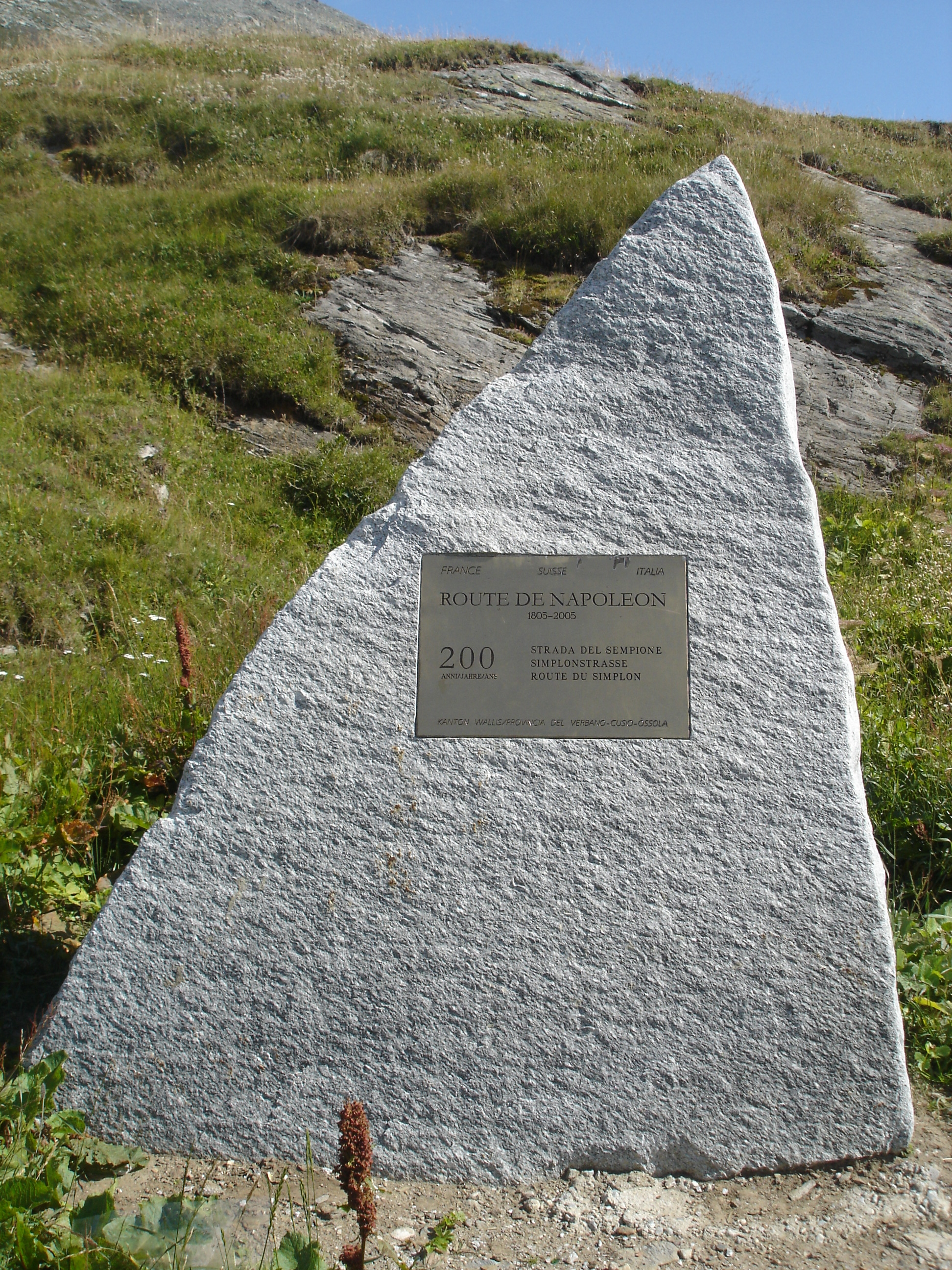 Gedenkstein Napoleon Passstrasse auf dem Simplon Schweiz